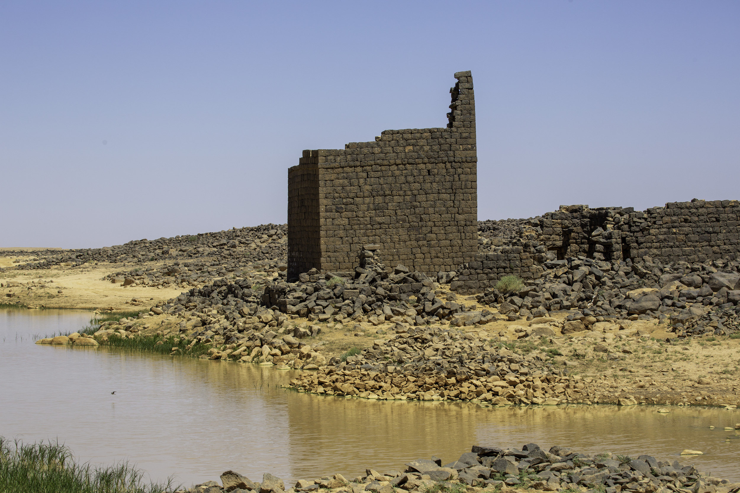 Qasr Burqu’ and Lake